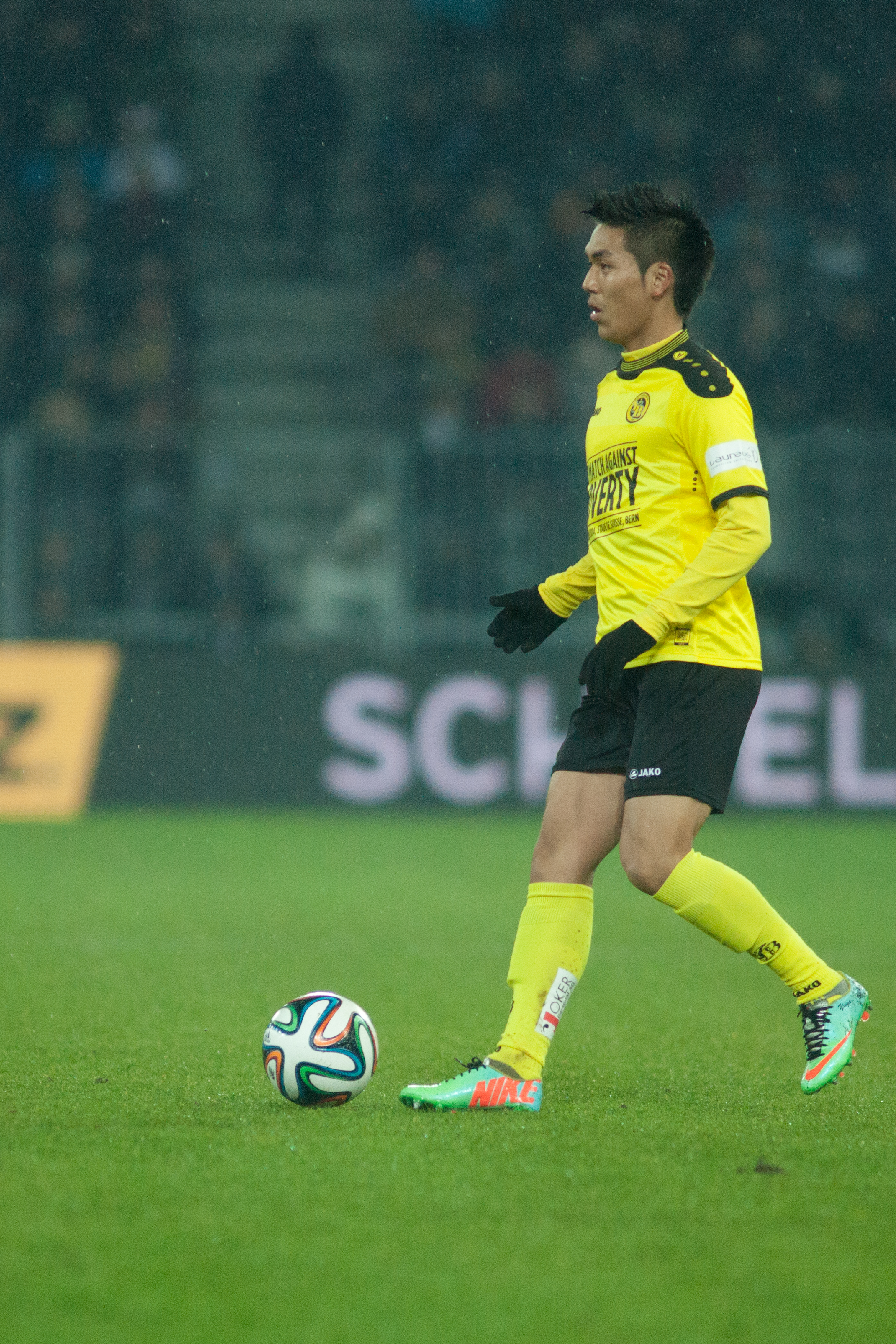 Football against poverty 2014 - Yuya Kubo